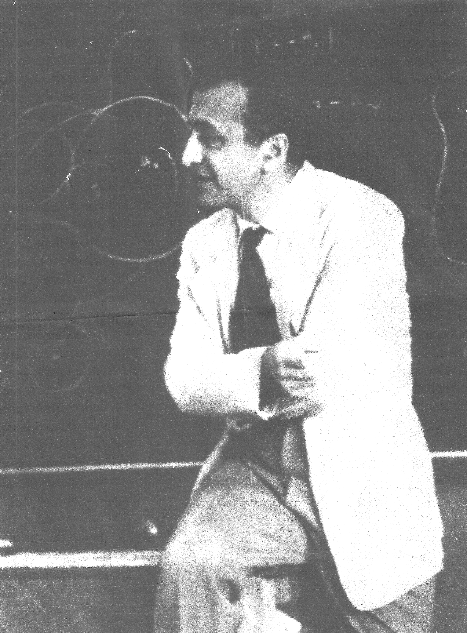 Arrigo Finzi nel Technion